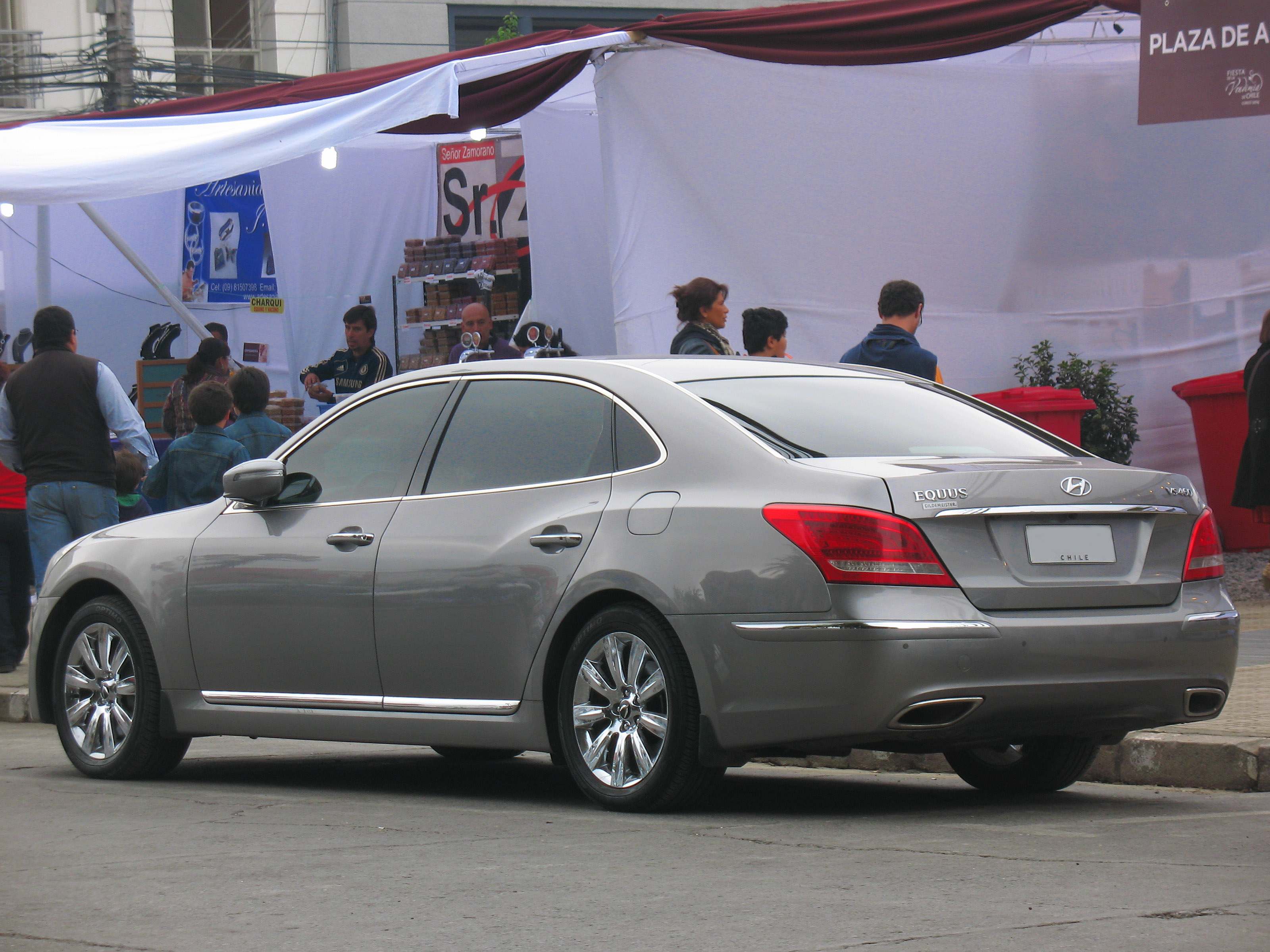 Hyundai Equus VS 460 GLS 2013